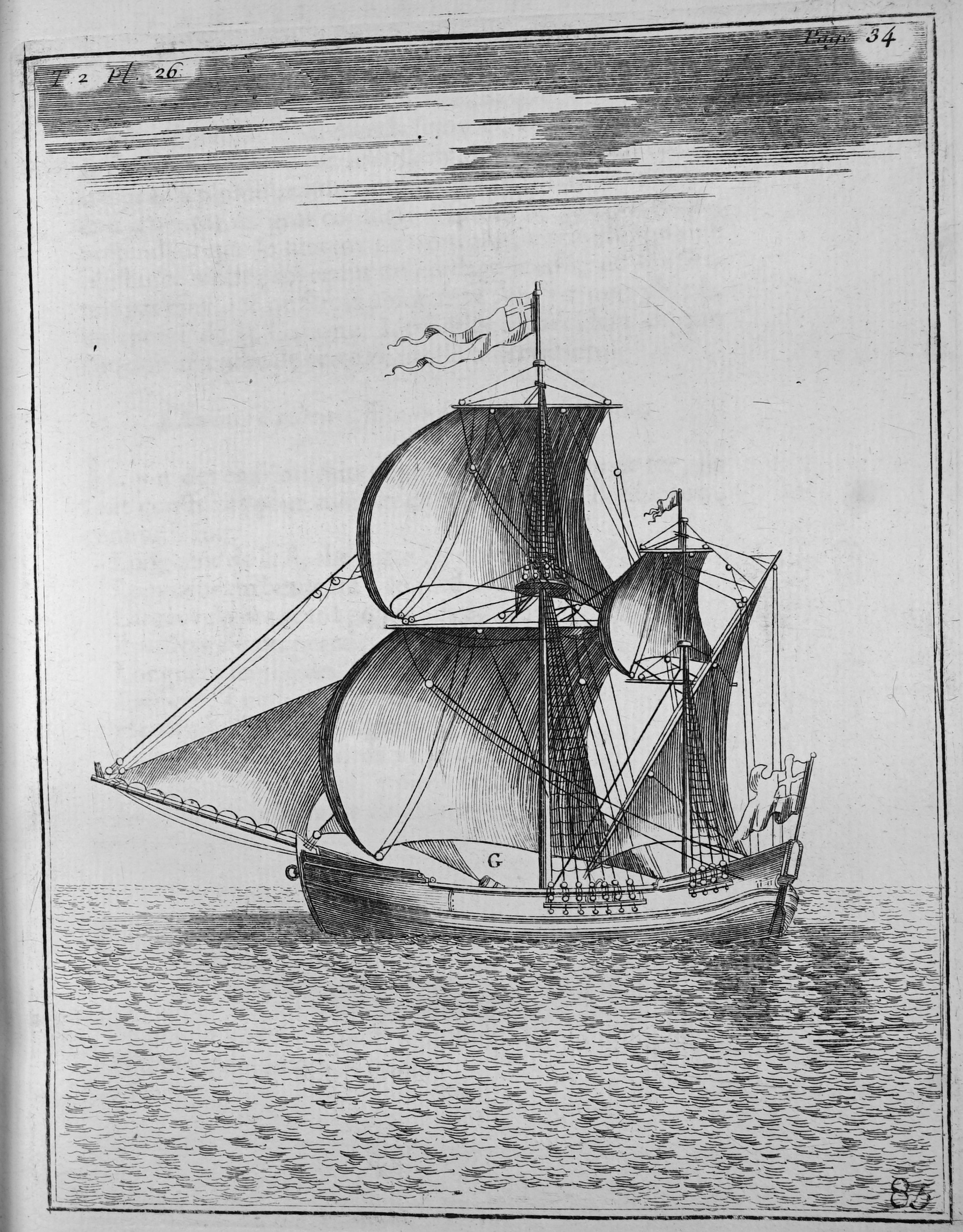 Mémoires d'artillerie, recueillis par M. Surirey de Saint Remy, tome II, exemplaire de la B.M. de Reims, troisième édition.